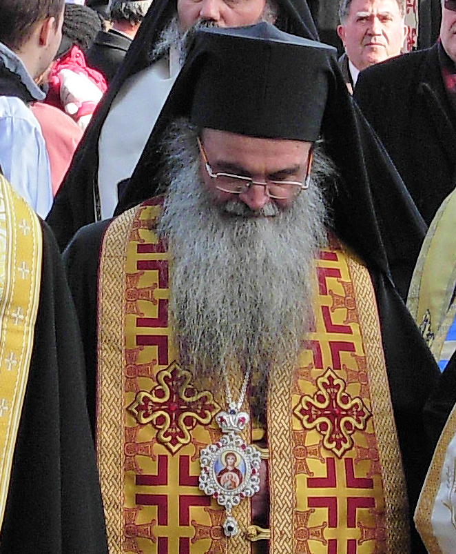 Predstavnici SPC na obeležavanju 70. godišnjice Novosadske racije.